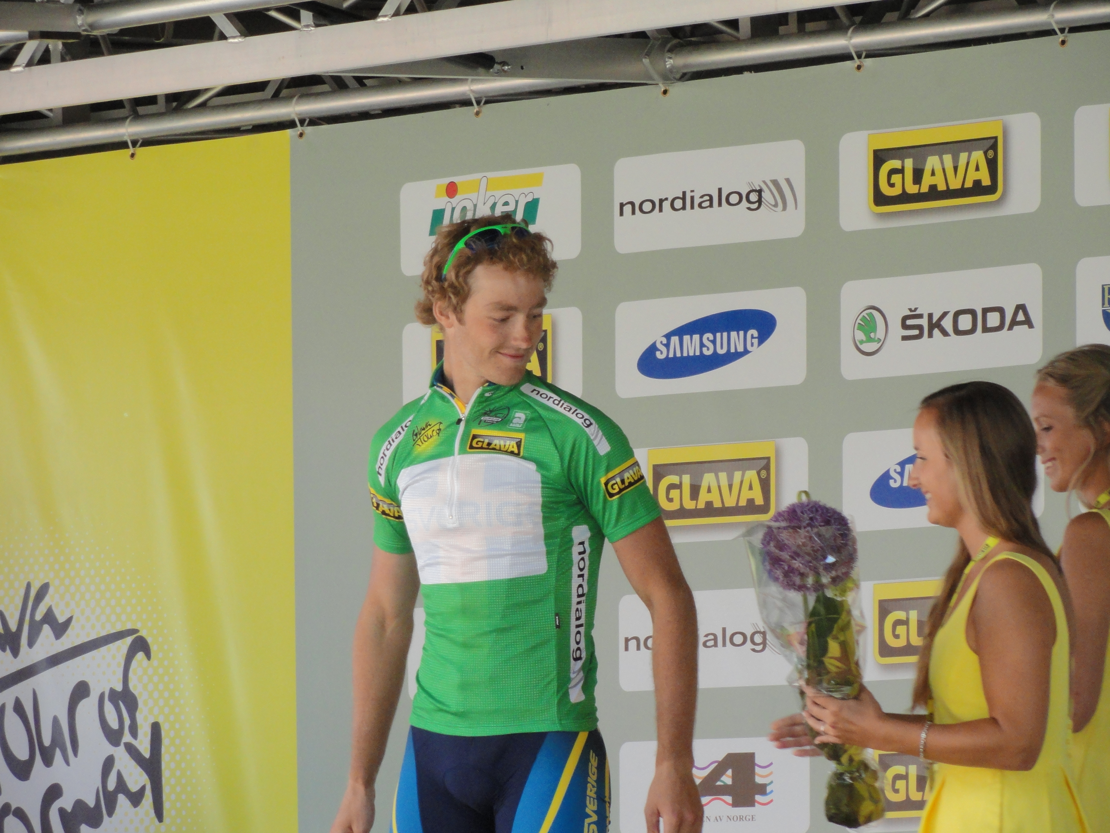 Vinner av poeng i ToN 2011